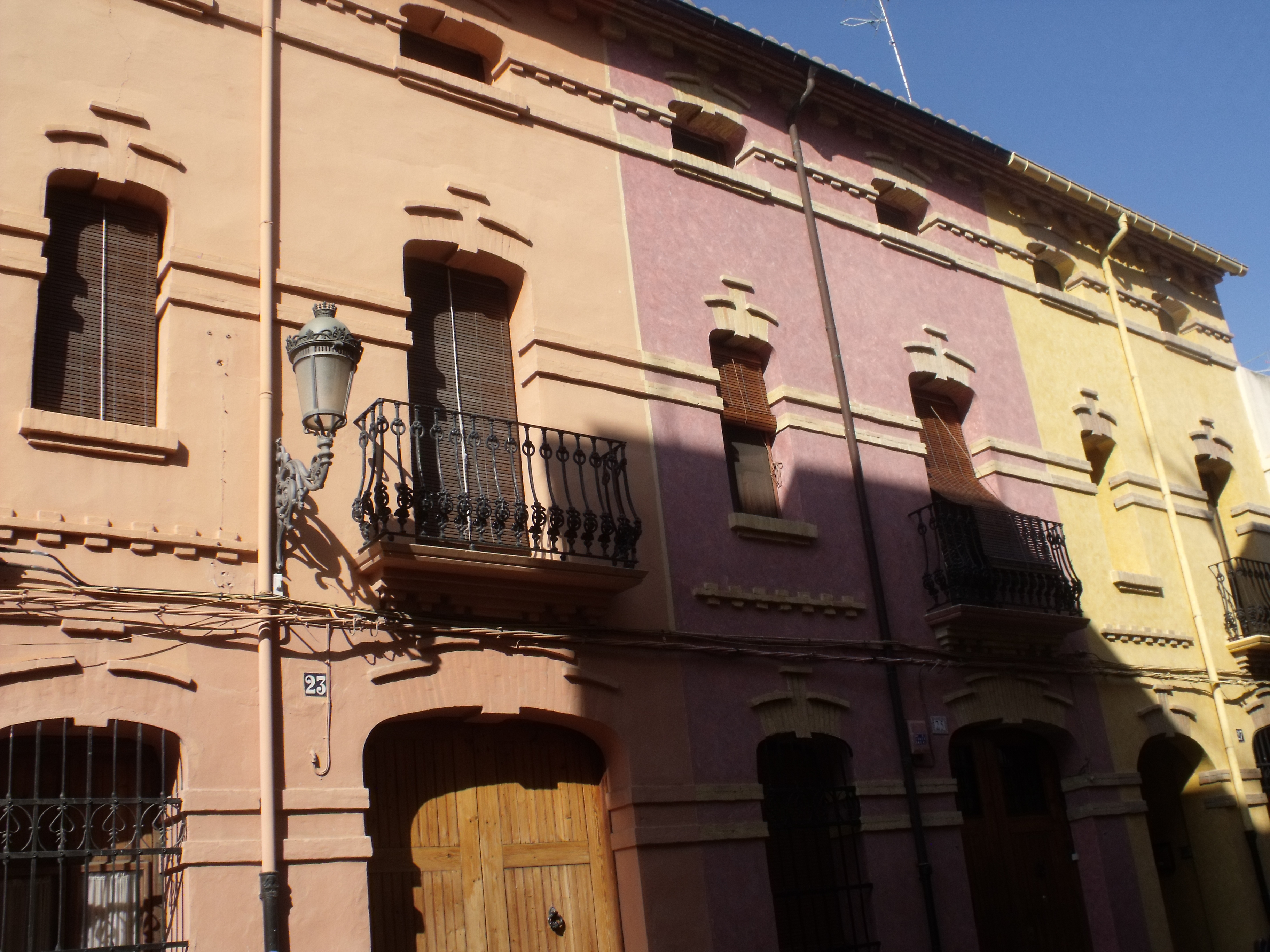 Bloque de casas en la calle Magraners del 17 al 27, construidos en 1903 por el arquitecto Bonaventura ferrando.